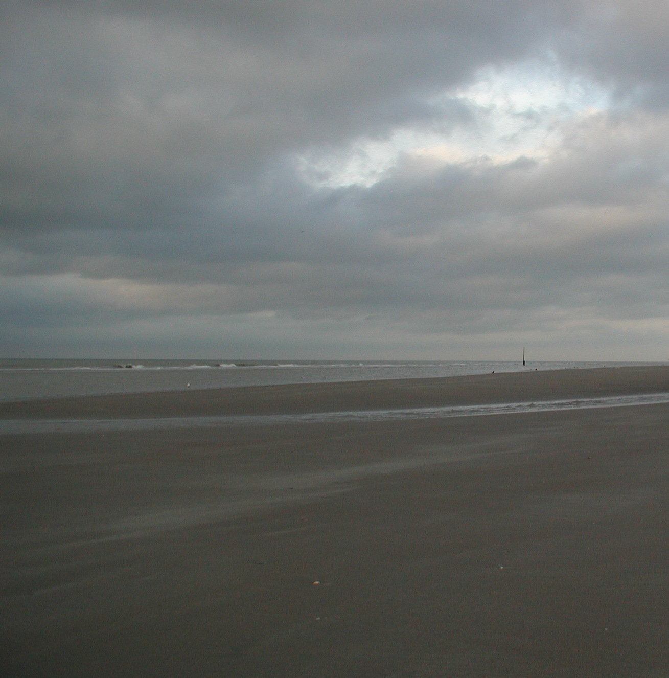 Oostduinkerke Strand, Koksijde, Belgium